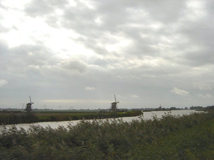 Rottemeren nabij Bleiswijk. Eigen foto Mark Voorendt, oktober 2004.